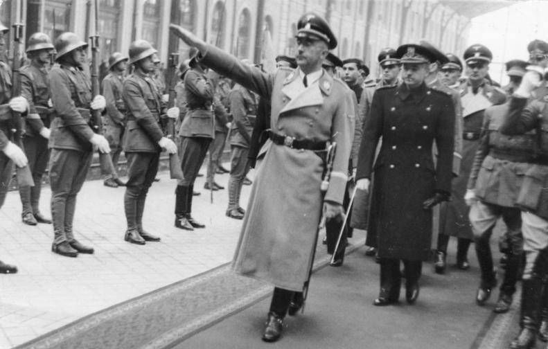 Llegada a Madrid del Jefe de la Policía Alemana Heinrich Himmler. Himmler pasando revista a las tropas que le rindieron honores a su llegada a la estacion del Norte. 9238-40